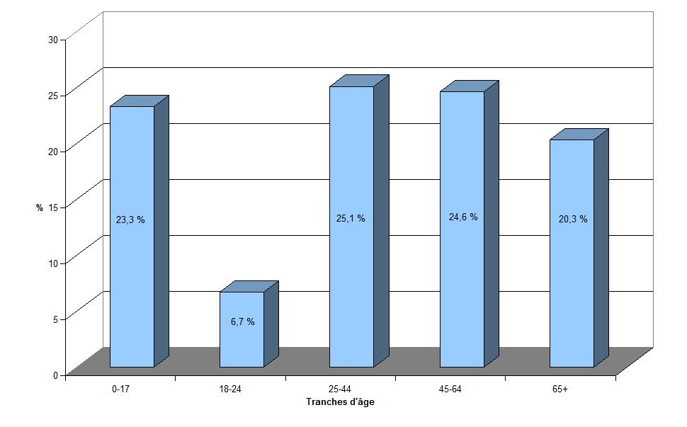 Répartition, par tranche d'âge, de la population d'Arroyo Grande (Californie, Etats-Unis), lors du recensement de 2000.